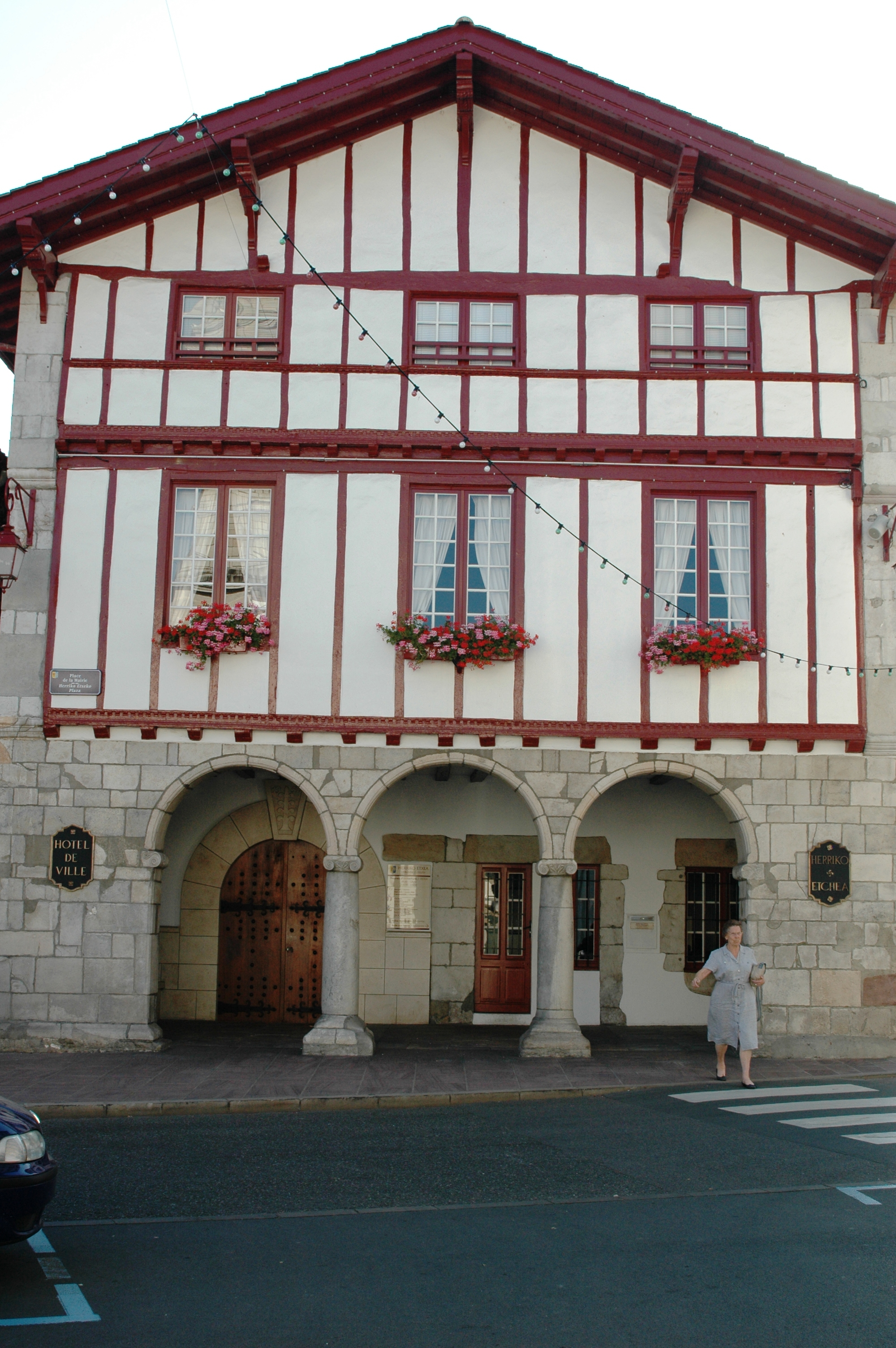 Urrugne, la mairie